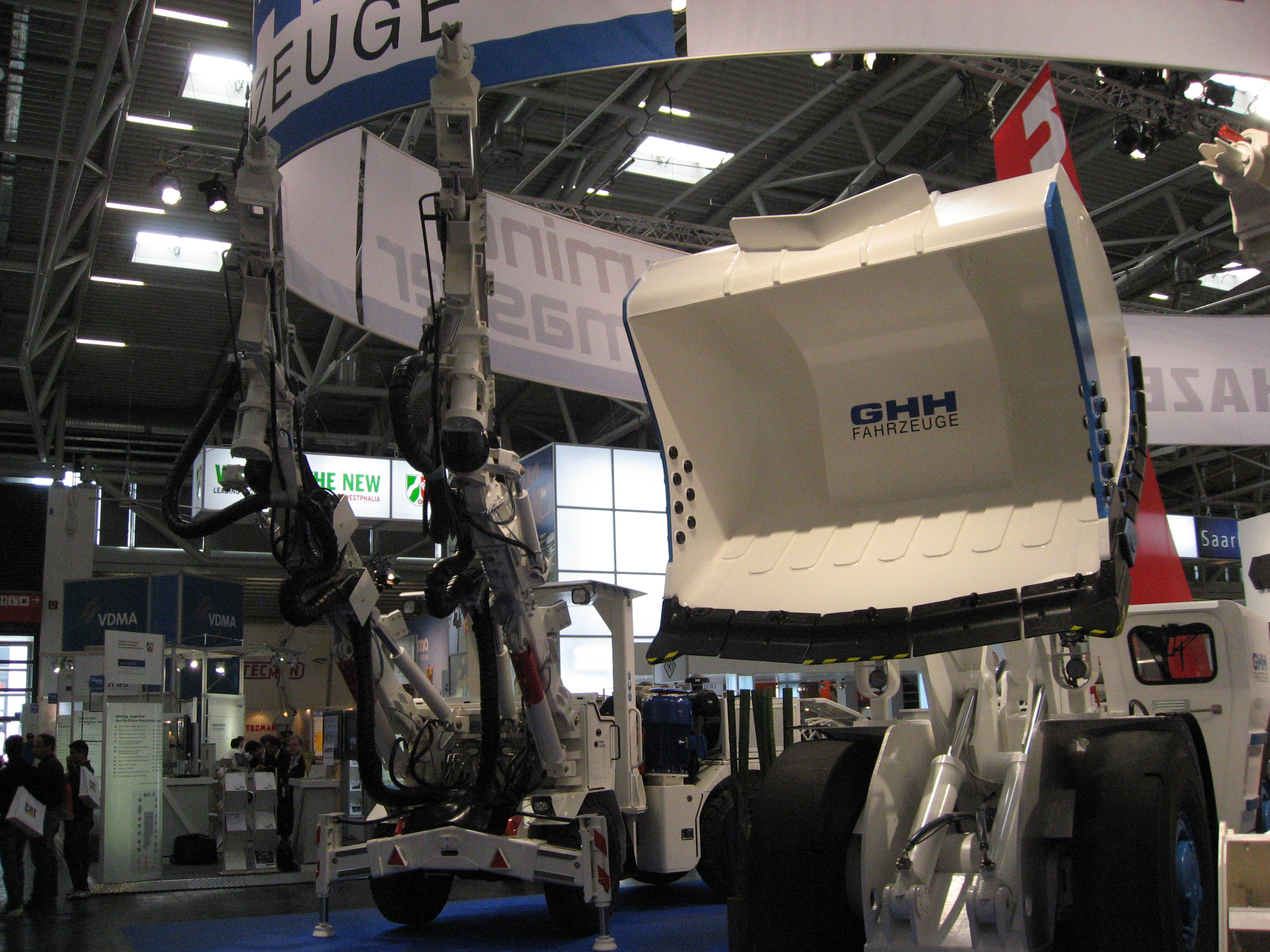 GHH Fahrlader und Bohrwagen aufgenommen auf bauma 2010 in München